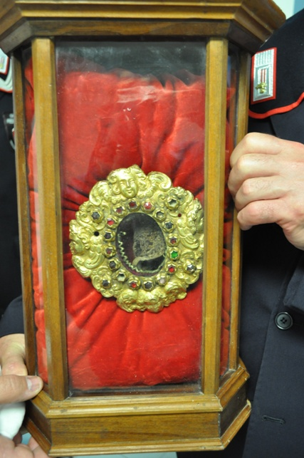 Reliquia del cuore di Sant'Alfio, martire cristiano nato a vaste, martire ed ucciso a Lentini per la sua proclamazione di fede in Cristo